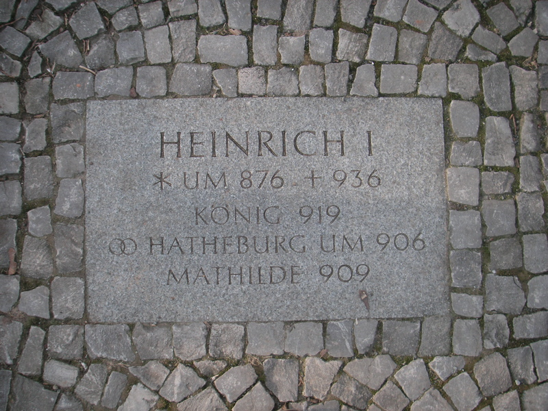 Der Weg der Ottonen: Heinrich I Fotografiert am Magdeburger Domplatz.